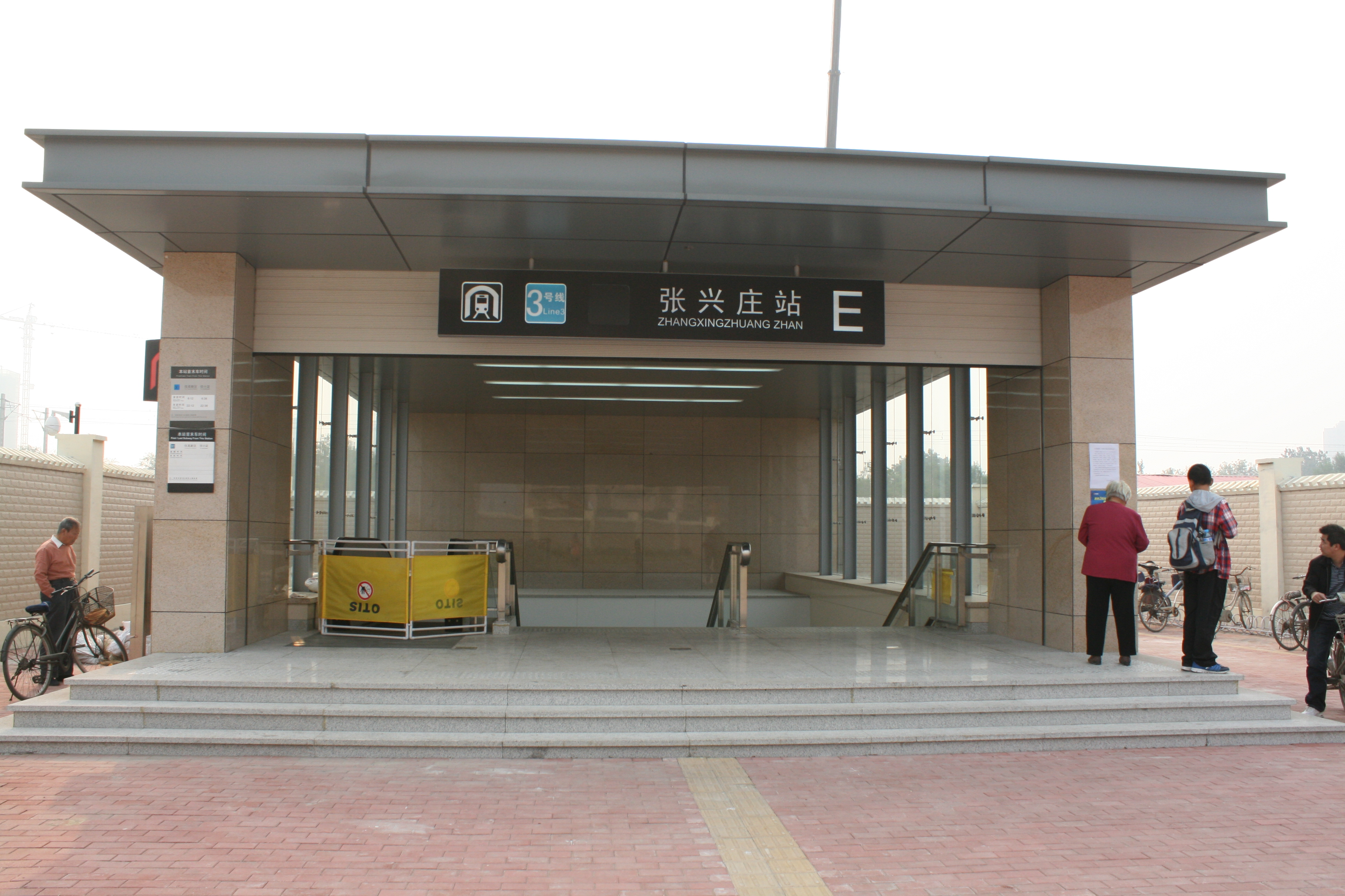 天津地鐵三號線張興莊站E出口 0001